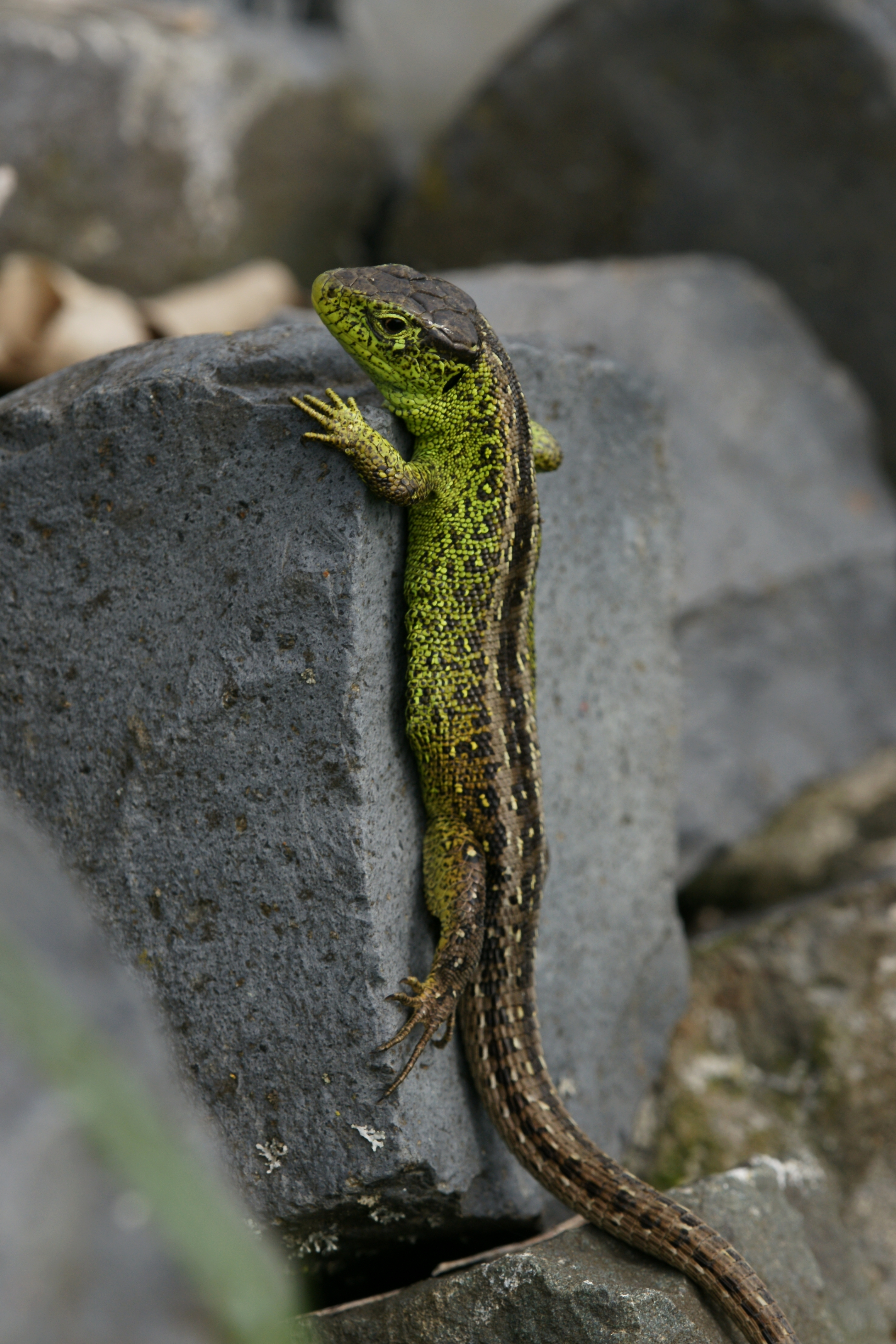 männliche Zauneidechse, (Lacerta agilis)